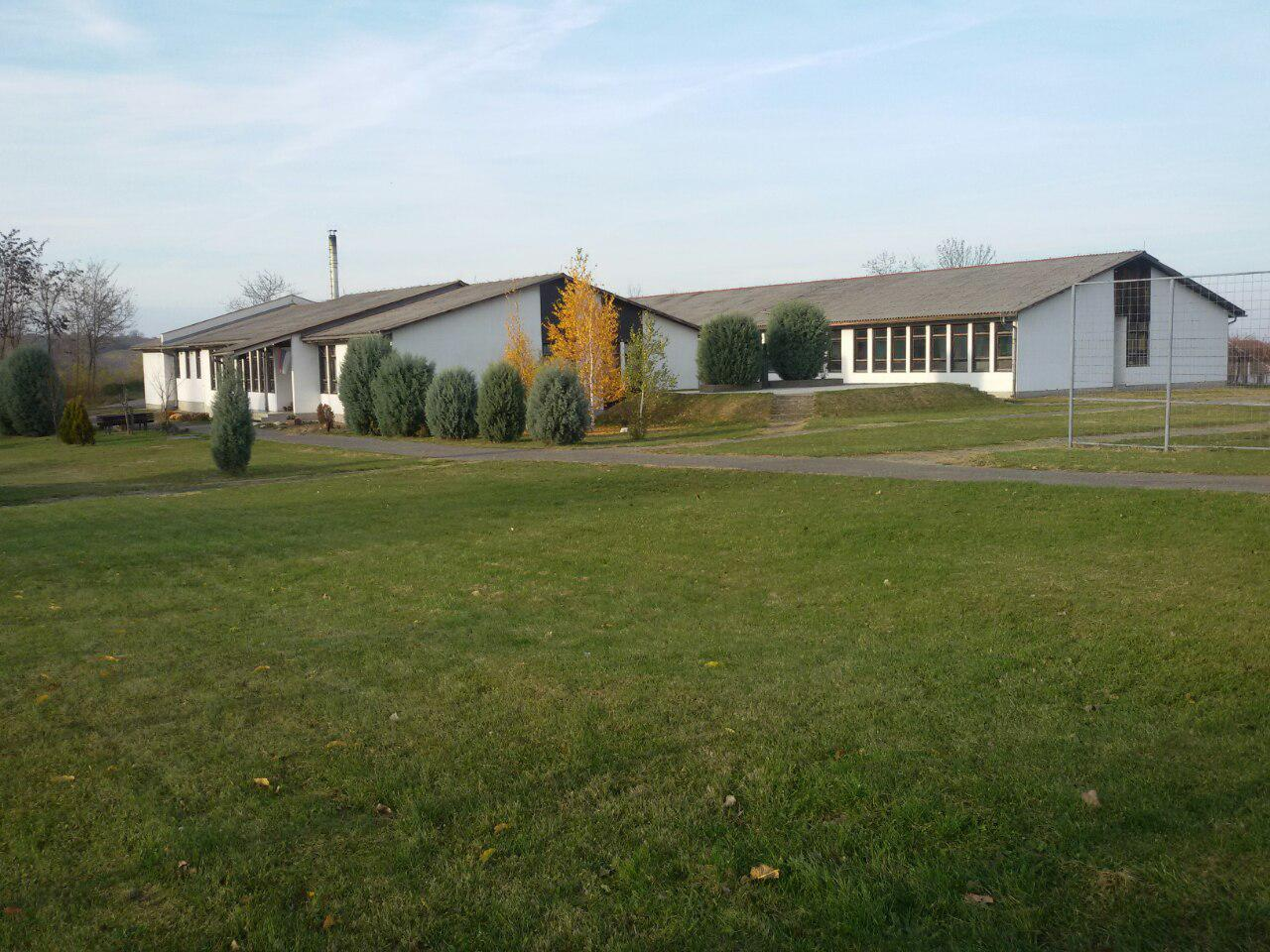 Нова школска зграда у Трнави изграђена средствима самодоприноса